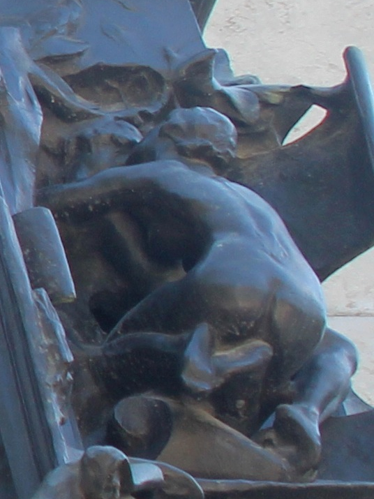 Genio Alado que cae como parte de la Puerta del Infierno